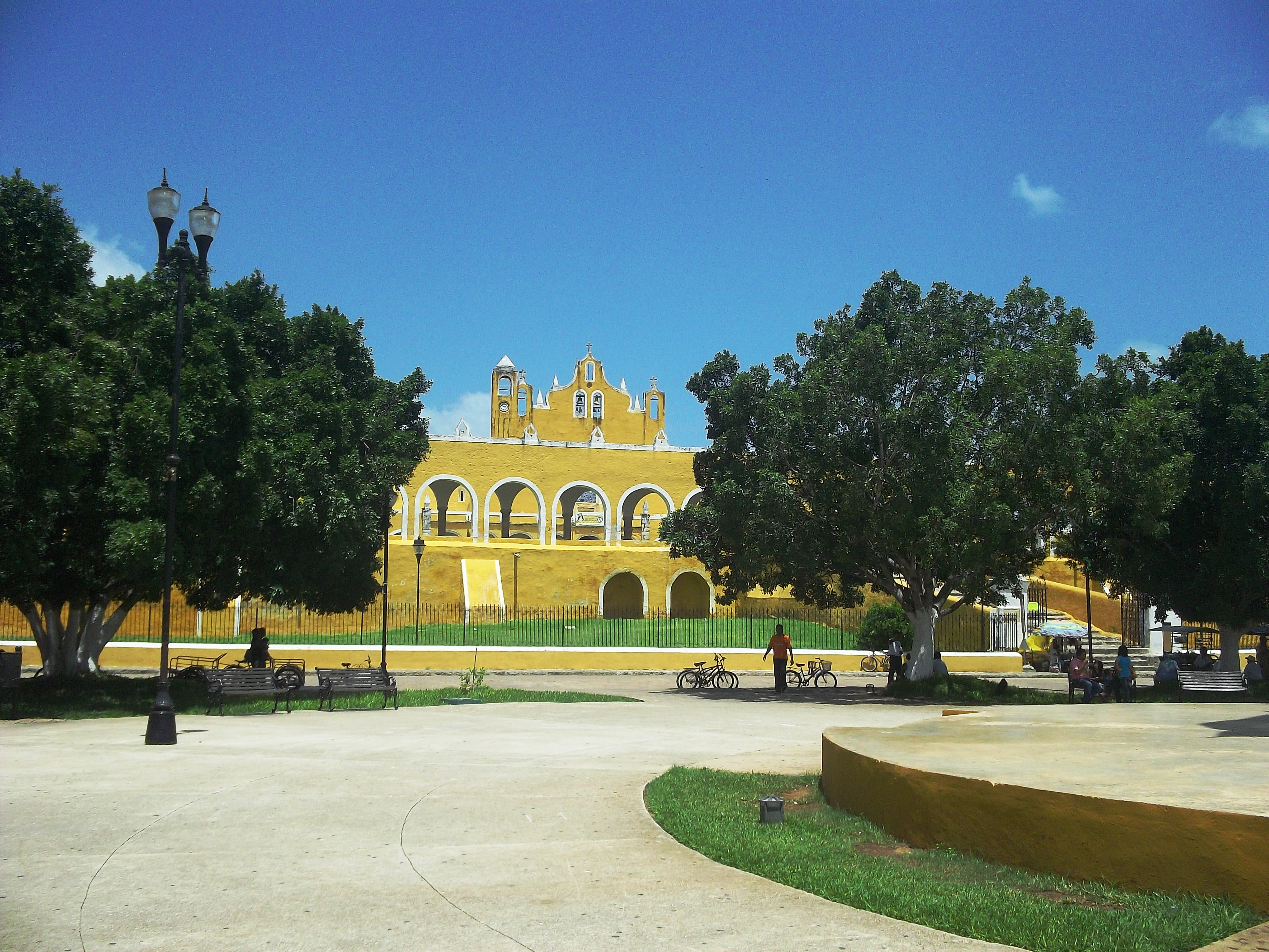 Convento de San Francisco en Izamal, Yucatán.